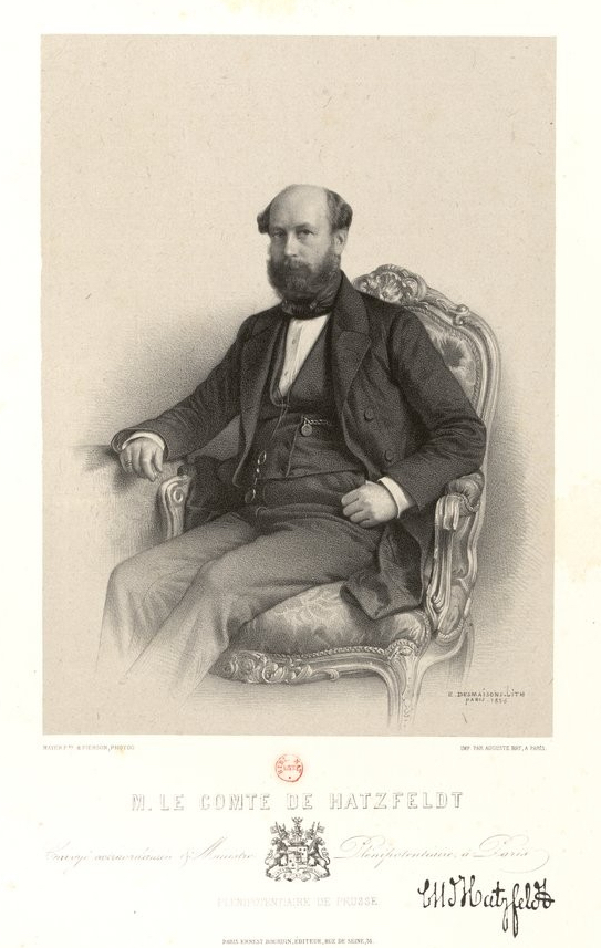 M. le Comte de Hatzfeldt Envoyé extraordinaire (et) Ministre plénipotentiaire à Paris Plénipotentiaire de Prusse